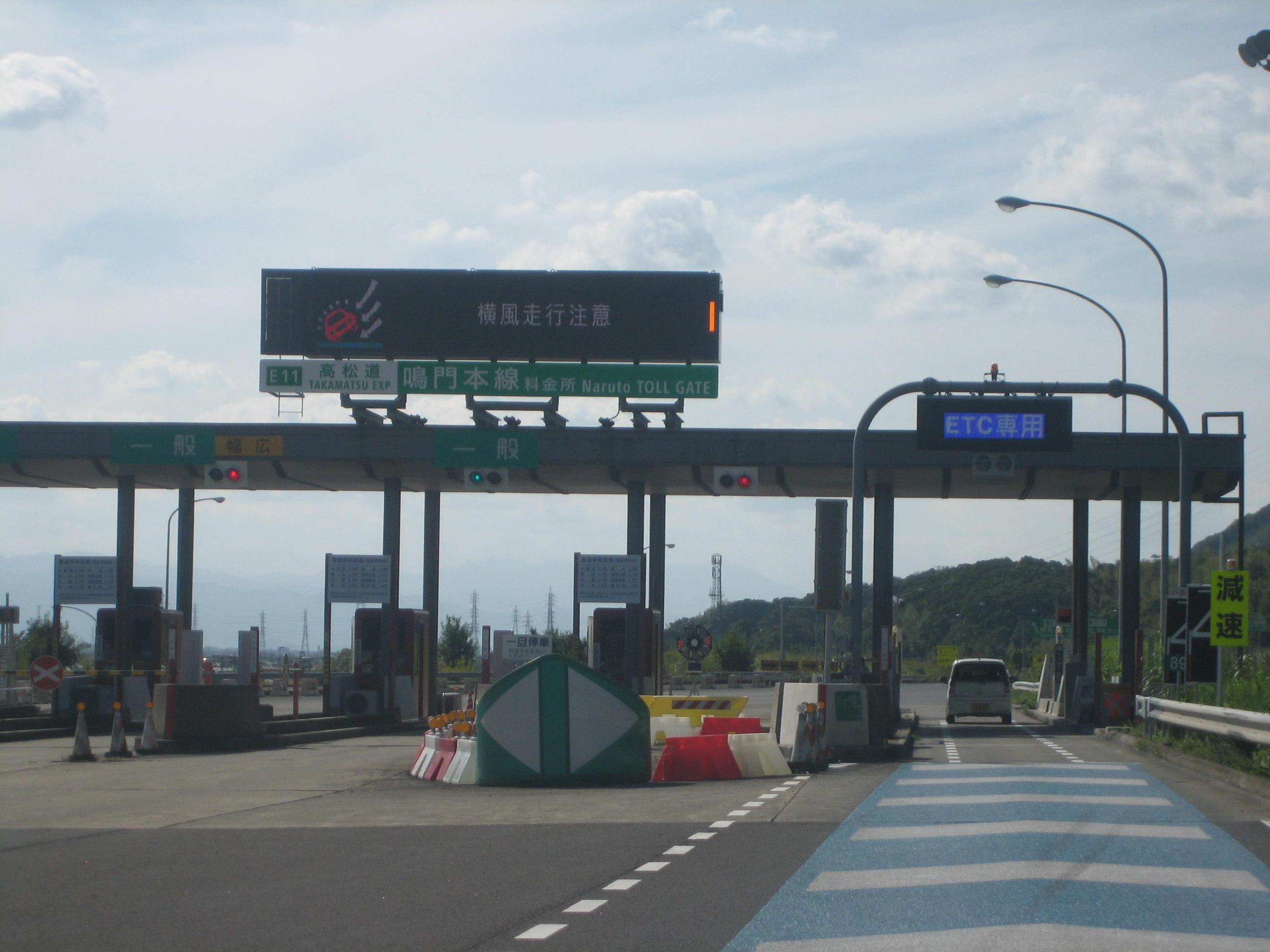 鳴門本線料金所